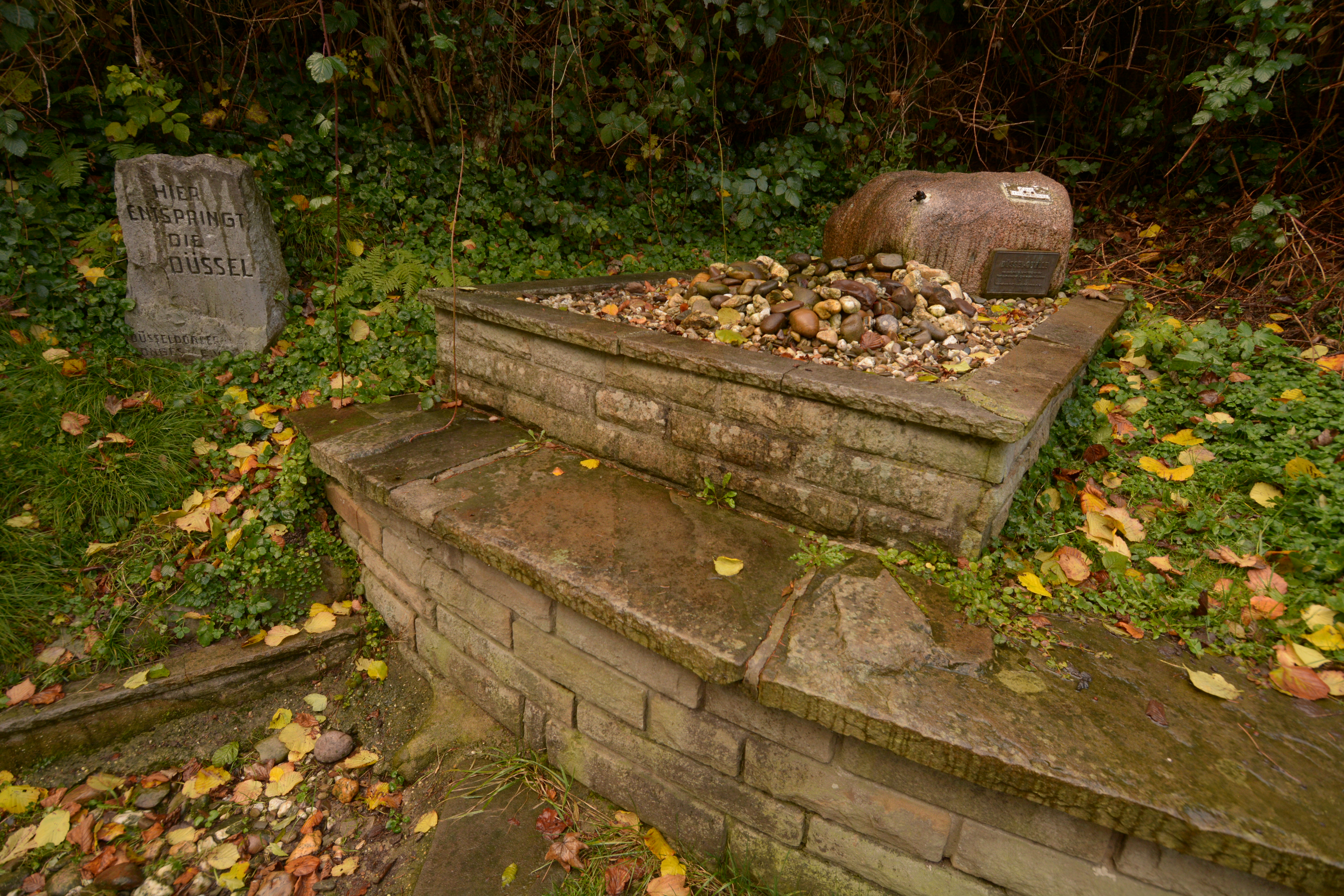 Düsselquelle in Wülfrath